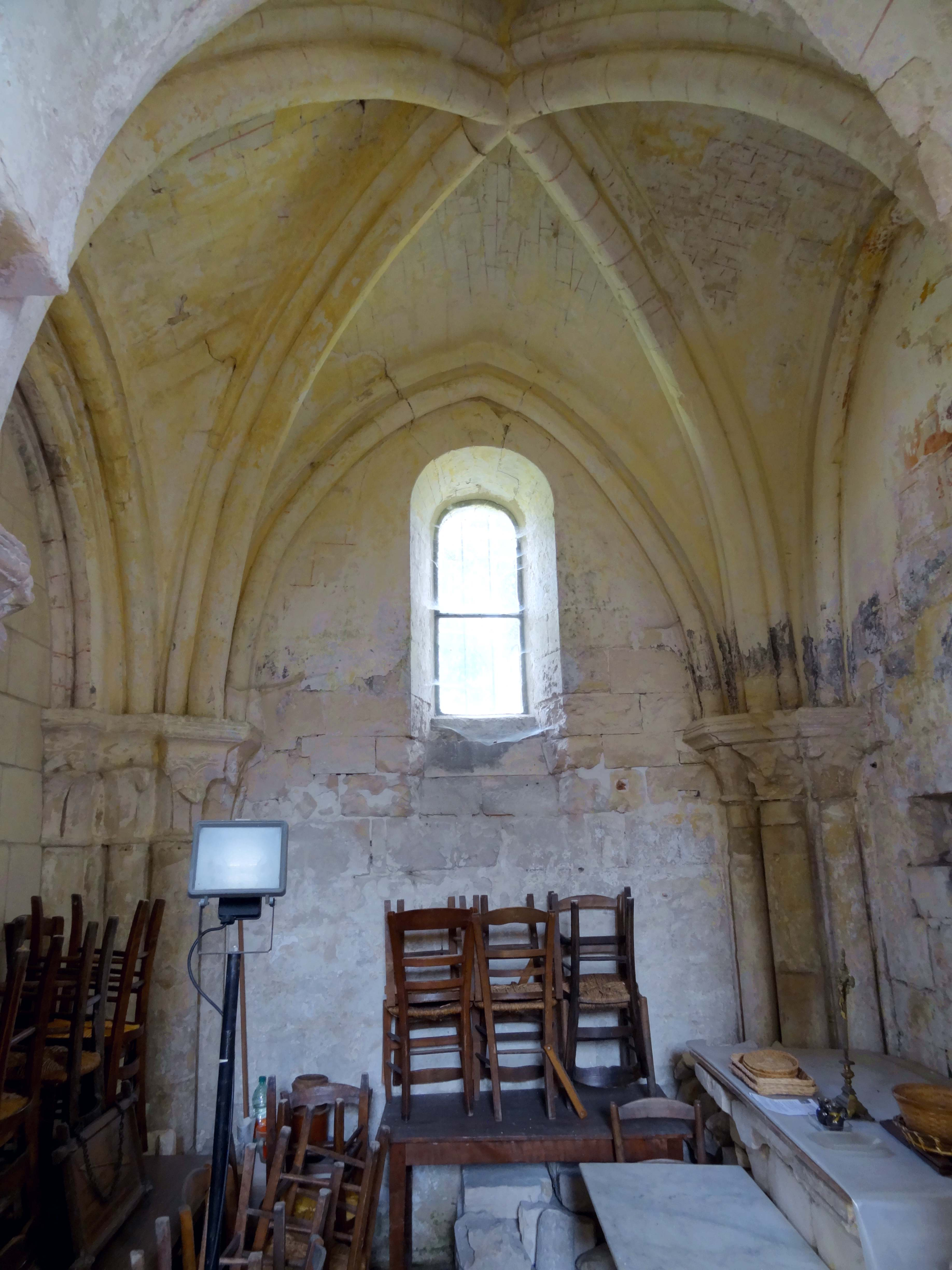 Intérieur de l'église - voir titre.